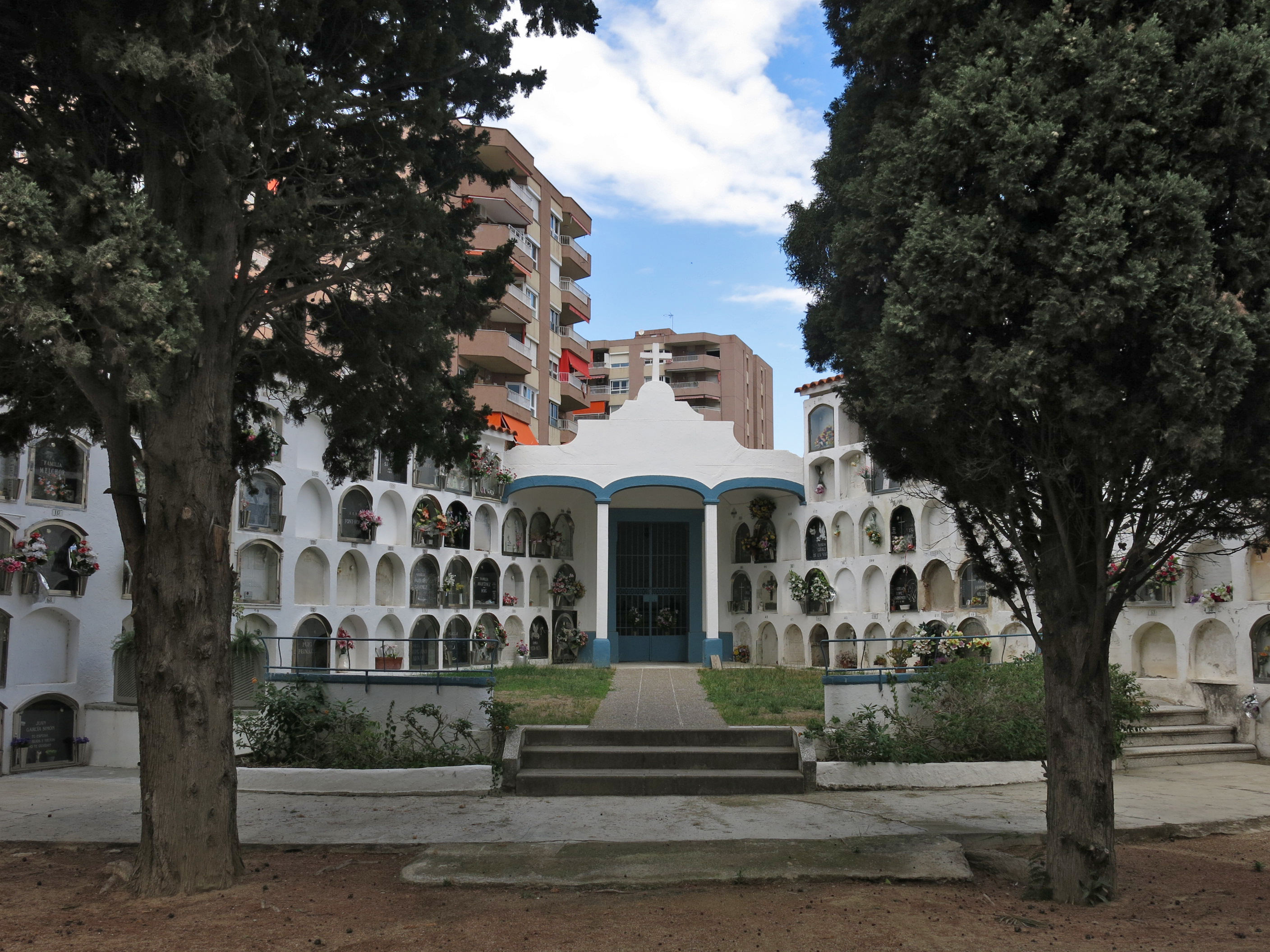 Capella de l'Ossera Municipal de Premià de Mar